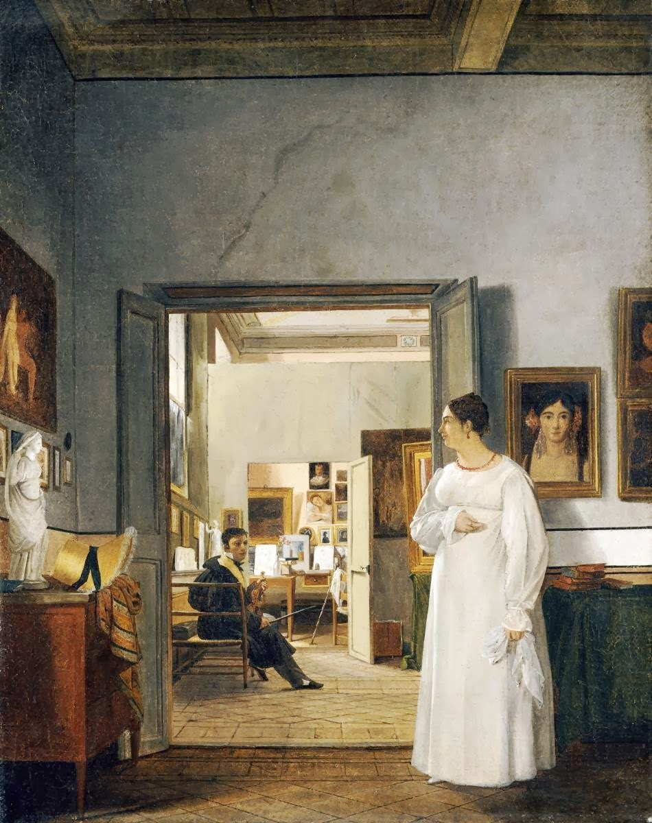 Jean Alaux, L'Atelier d'Ingres à rome 1818 deuxième version, coll. particulière